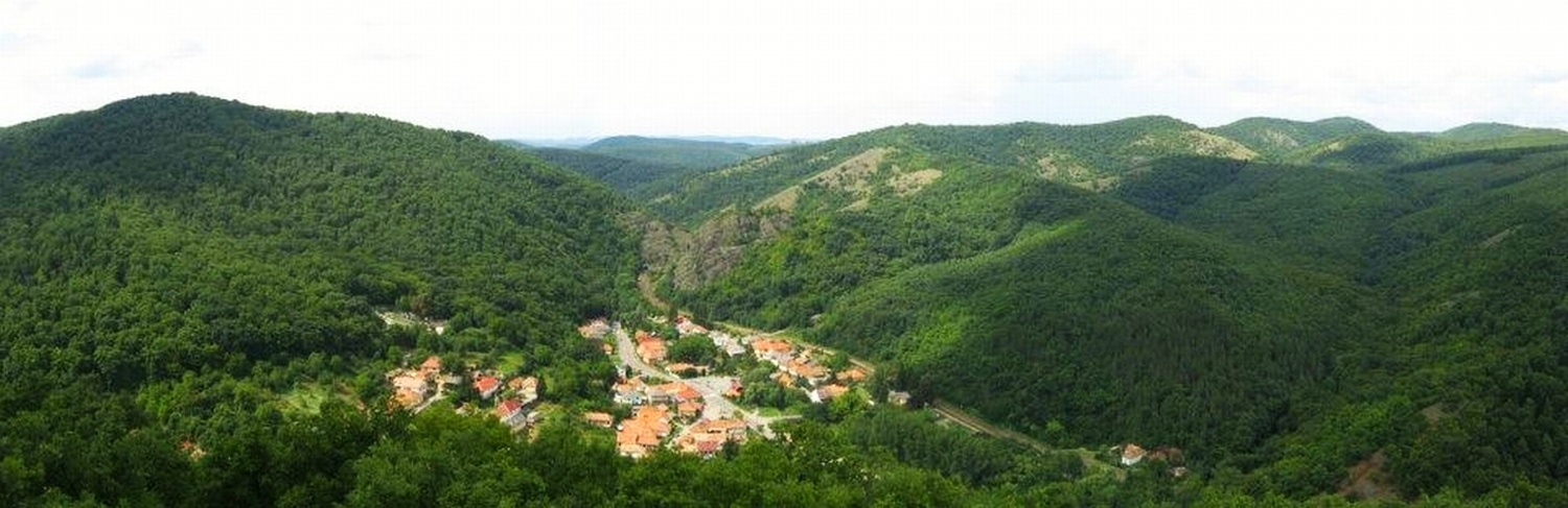 Kilátás a Major-tetői kilátóból Szarvaskőre.